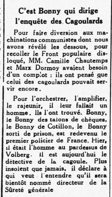 L'hebdomadaire Le Nouvelliste d'Indochine dénonce le rôle supposé de l'ex-inspecteur Pierre Bonny dans l'affaire de la Cagoule en 1937.